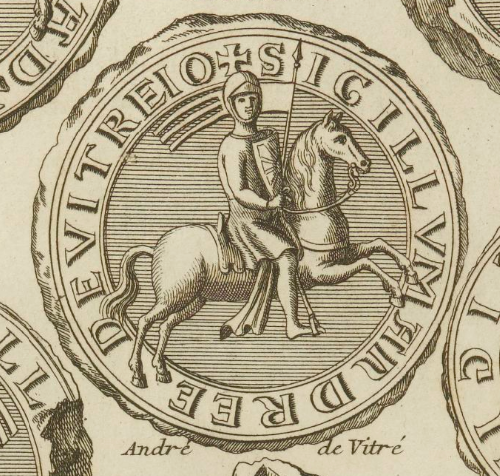 André de Vitré